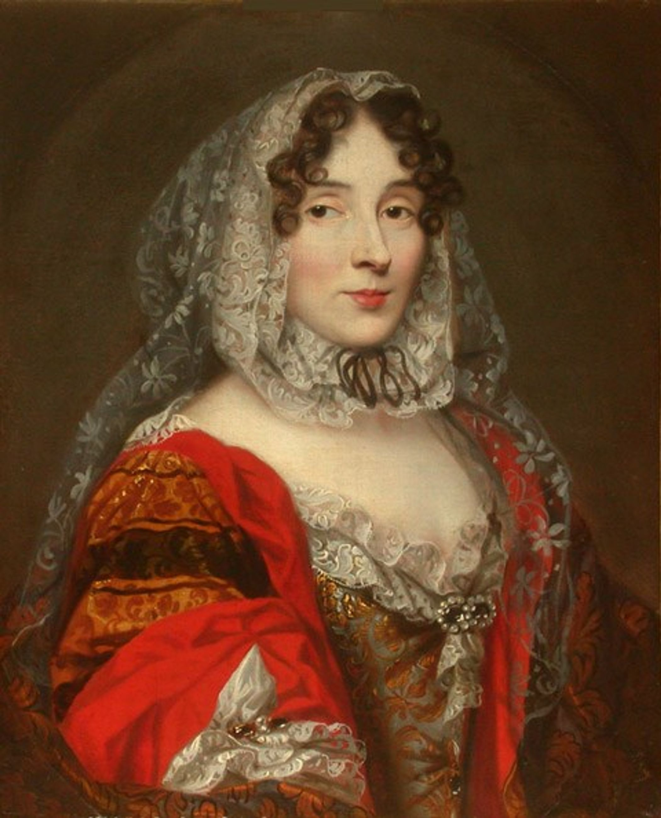 Porträt vermutlich von Anne Marie de La Trémoille, princesse des Ursins (1641-1722)